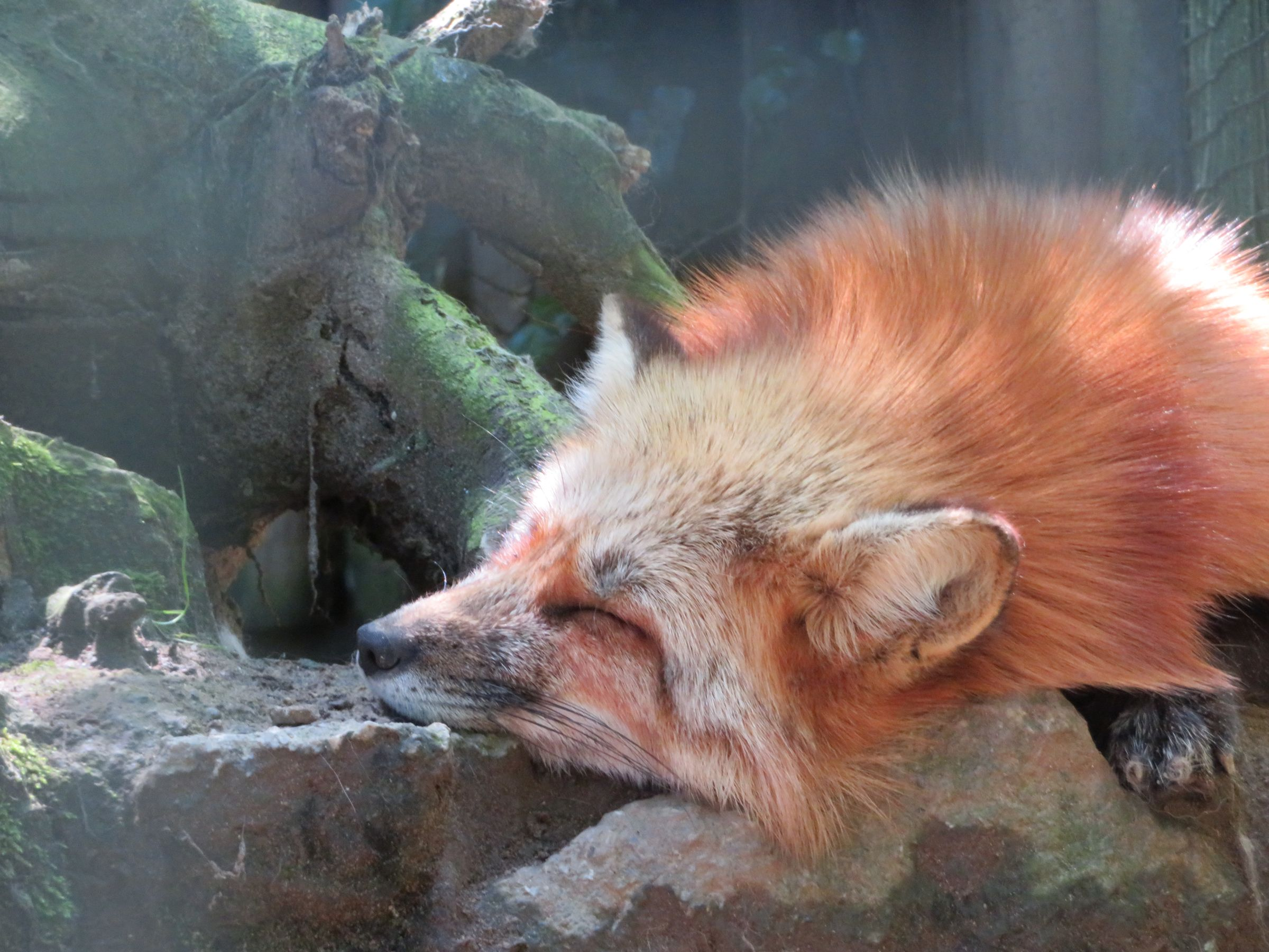 Rotfuchs im Schwarzwaldzoo Waldkirch